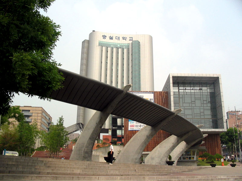 숭실대학교 정문